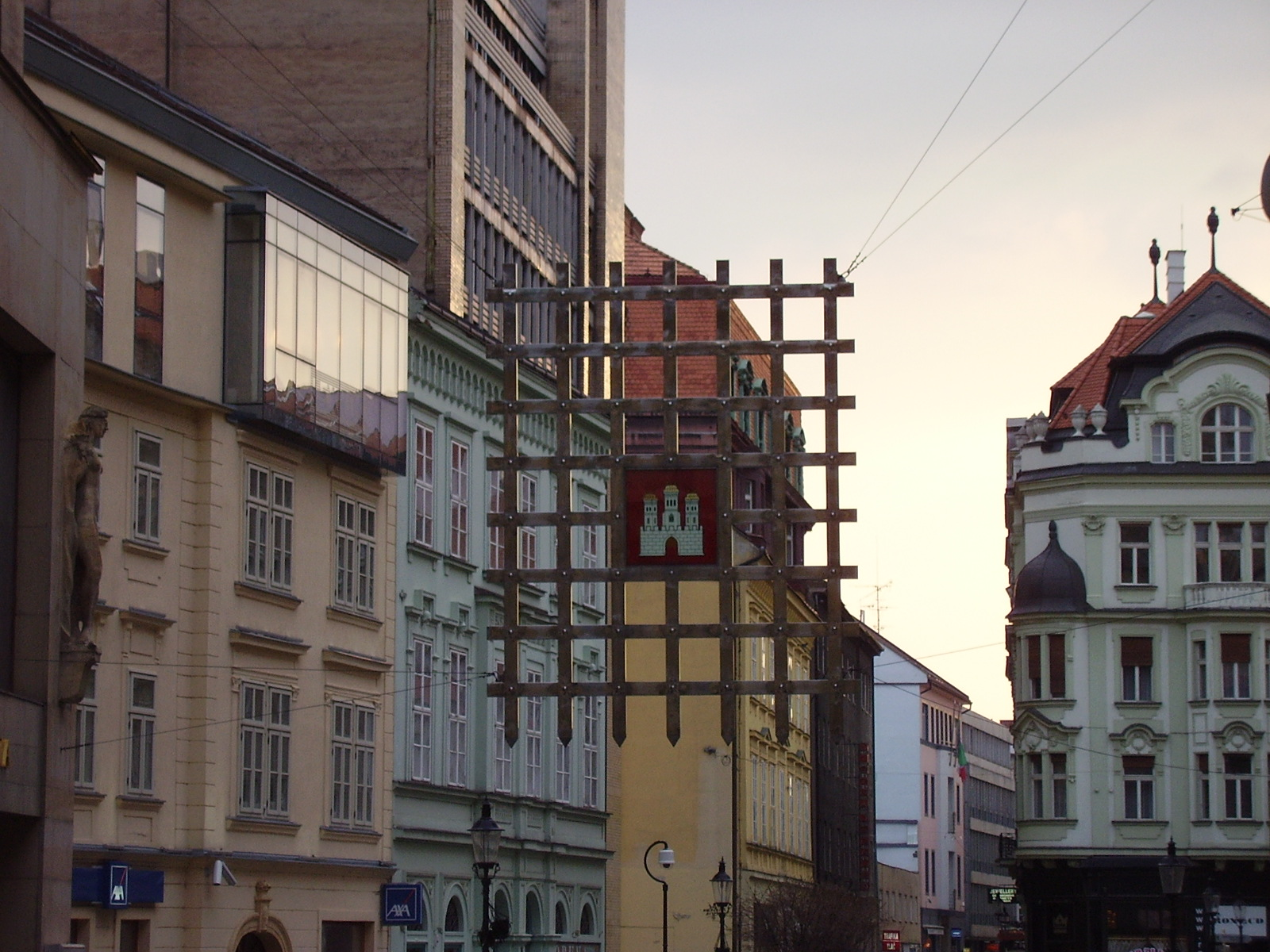 Zavesená ozdobná mreža naznačuje miesto, kde stávala Laurinská mestská brána